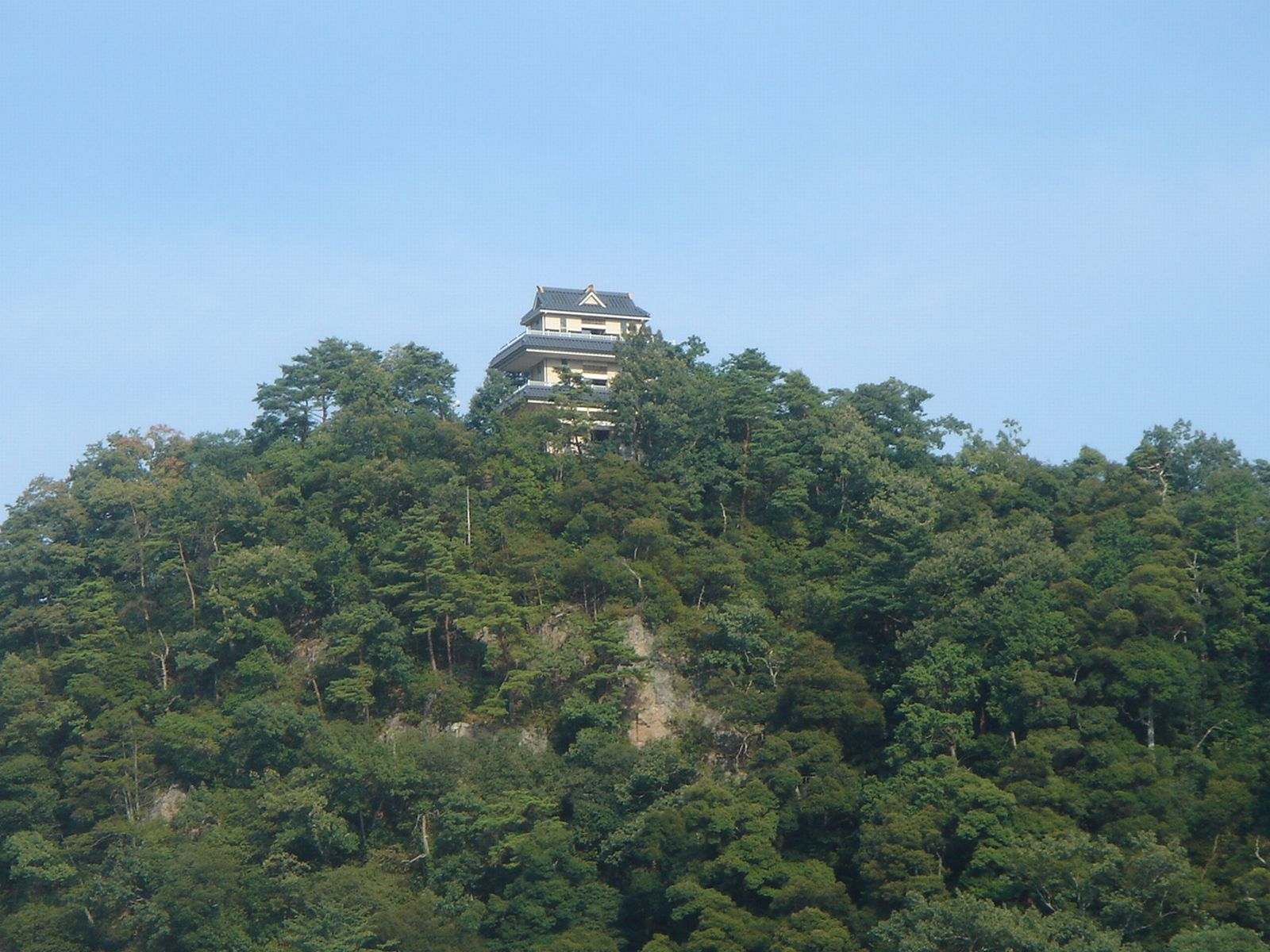 Ogurayama Observatory（小倉山の展望台）,Mino,Gifu,Japan(岐阜県美濃市)で撮影。